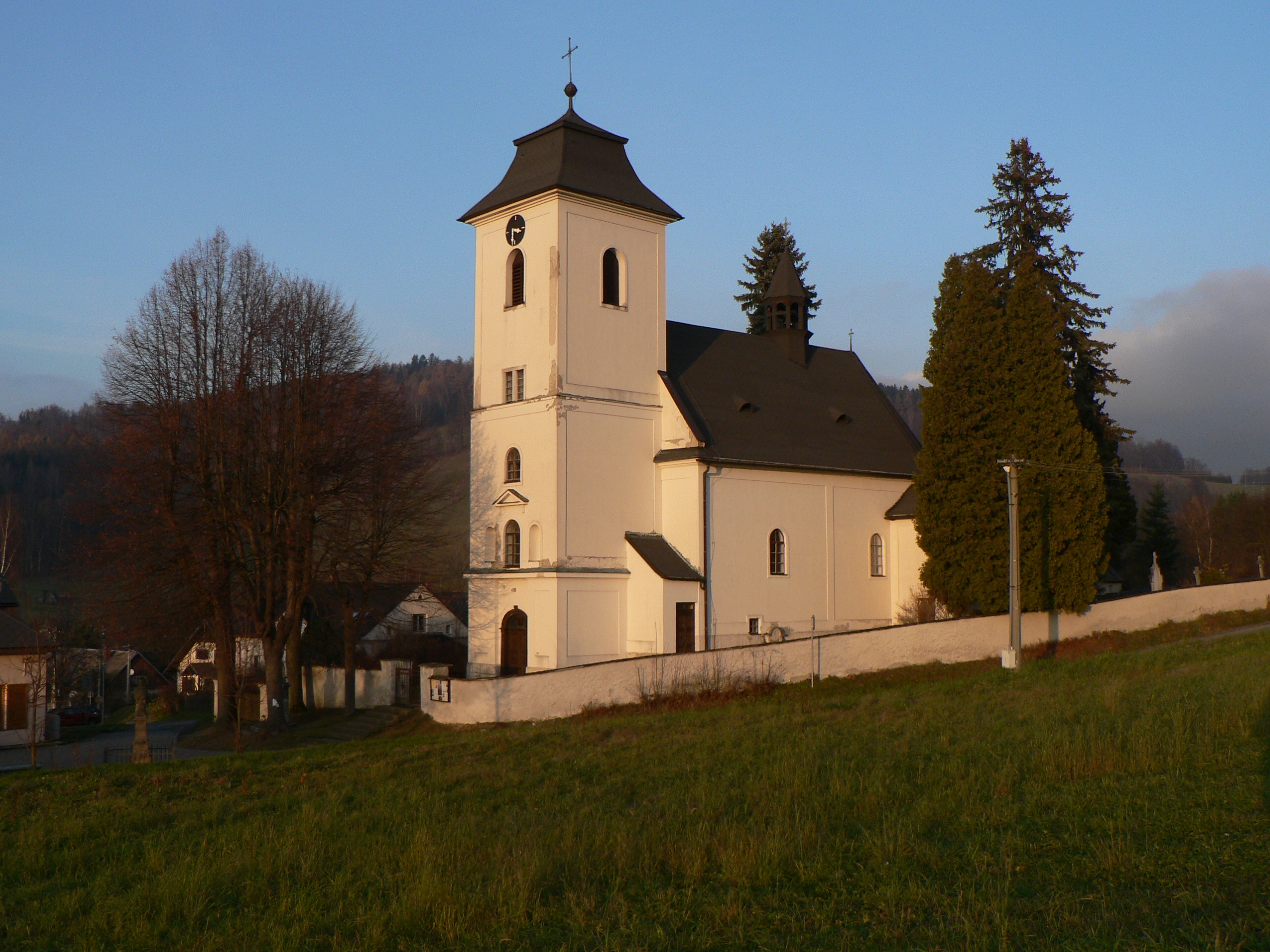 Kostel svatého Filipa a Jakuba (Hraběšice)